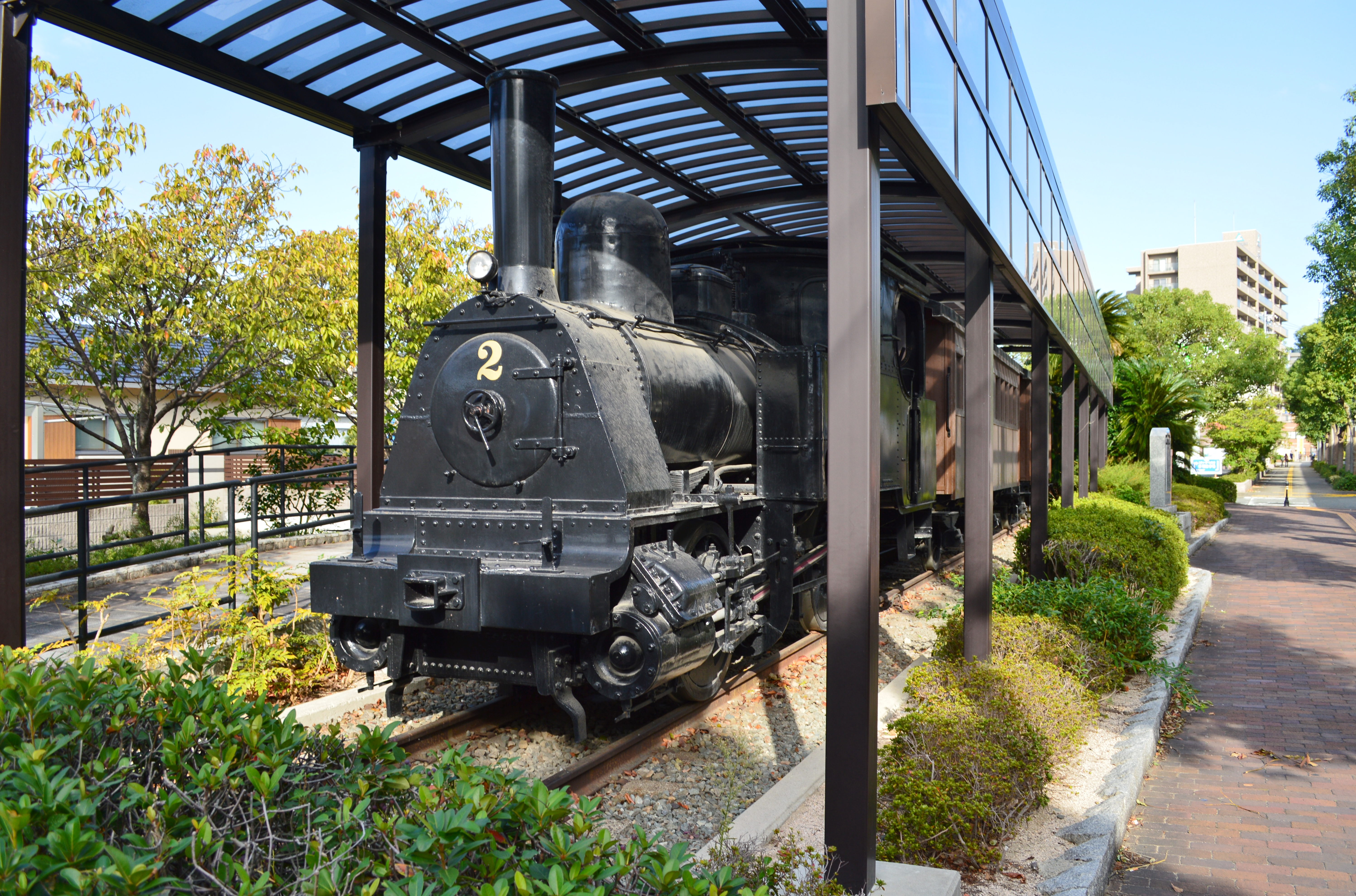 防石鉄道2号 (鉄道記念広場にて)